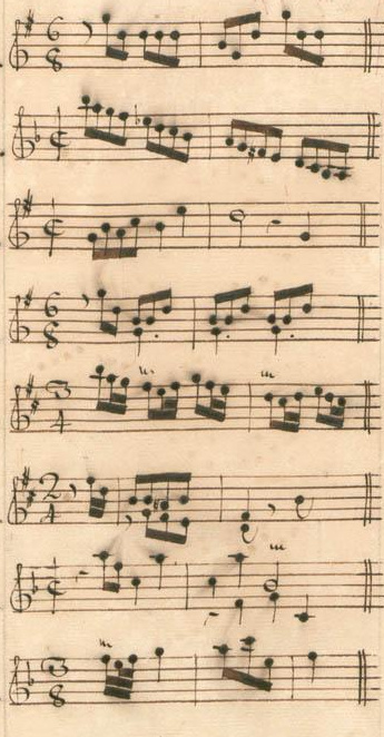 Table du volume X des manuscrits de Parme (incipit des sonates 15 à 22, K. 372-379).